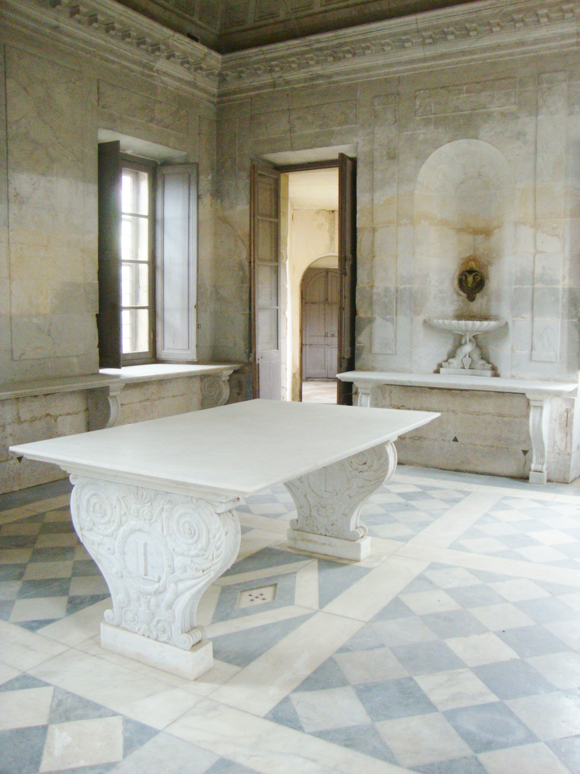 Laiterie - Hameau de la Reine